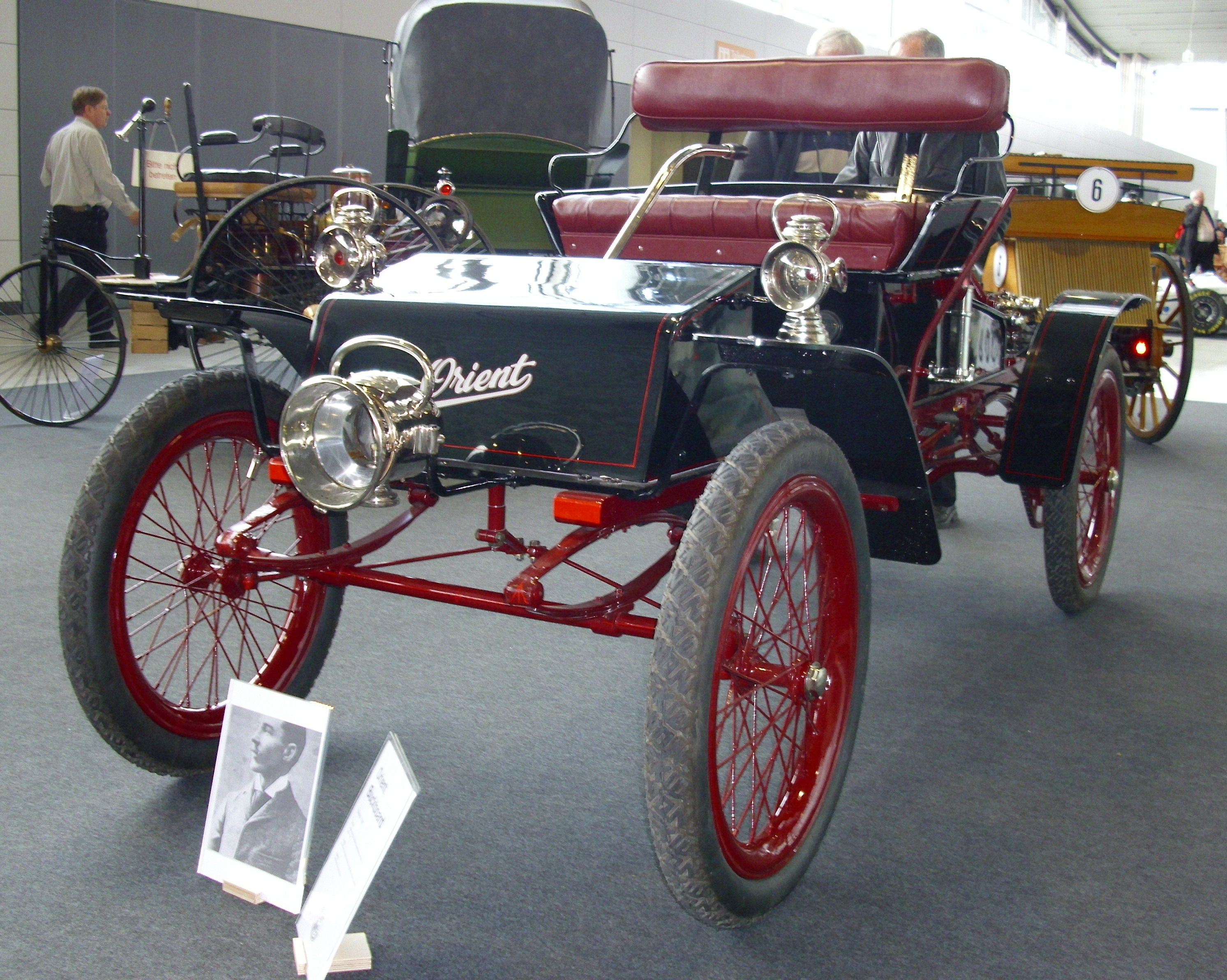 Orient von 1906 bei der Retro Classics 2011 in Stuttgart.